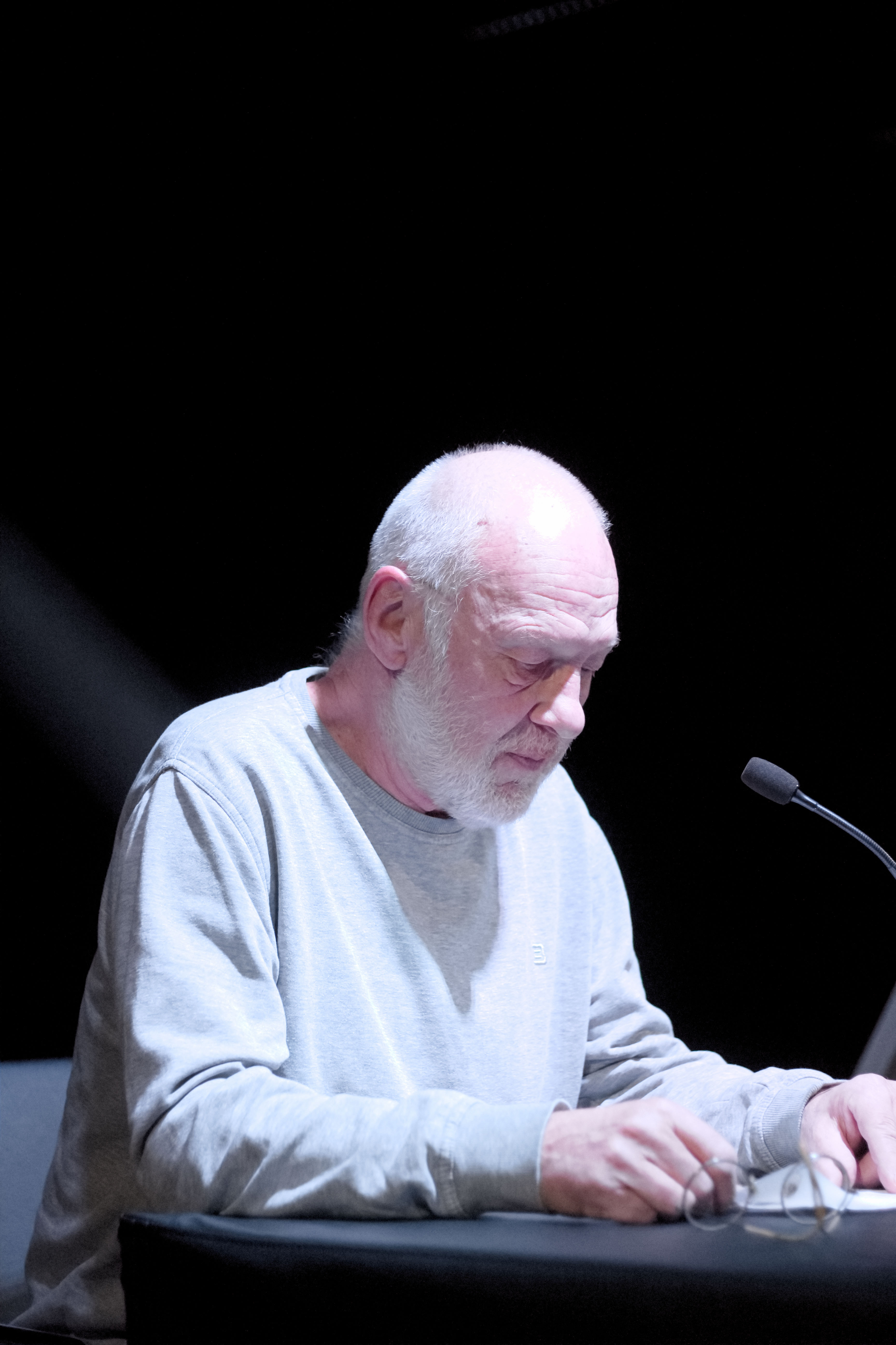 Der Komponist und Autor Wolfgang Danzmayr bei einem Leseauftritt im Dezember 2016 in der Panoramabar der Stadtbibliothek Salzburg.